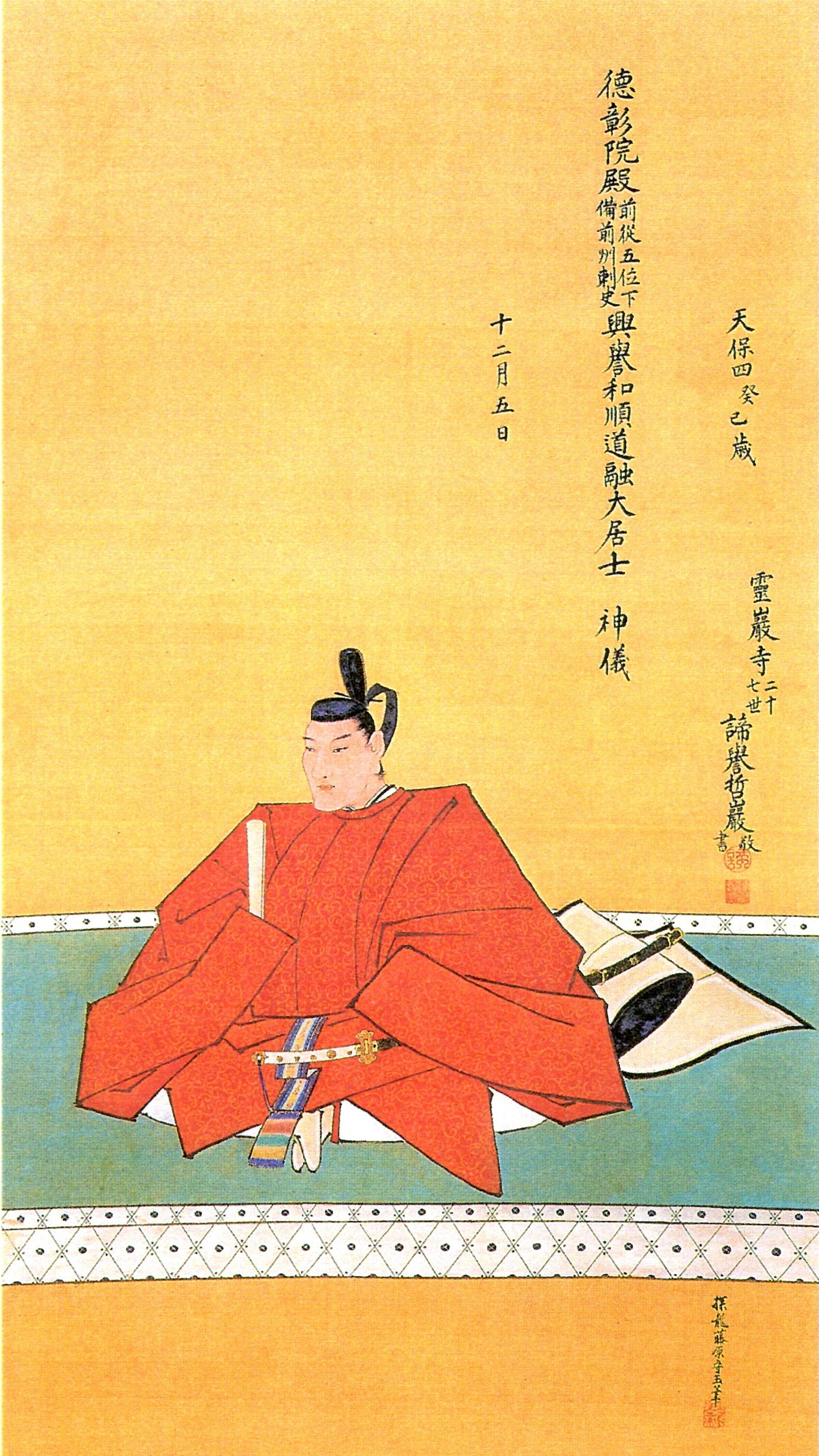 京極高倍の肖像。